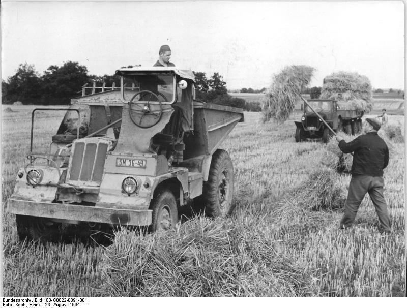 LPG Wurzen-Bennewitz, Abräumen von Stroh Zentralbild Koch 23.8.1964 Ernteeinsatz am Wochenende. Zu den vielen freiwilligen Helfern, die am Wochenende bei der Ernte halfen, gehörten im Bezirk Leipzig die Kollegen des Dienstleistungskombinates der Stadt Wurzen und die Kollegen des VEB Schamottekobinates Brandis, Werk Bennewitz, die mit ihren Fahrzeugen den Genossenschaftsbauern der LPG "Ernst Thälmann" in Wurzen-Bennewitz das Stroh bergen halfen.